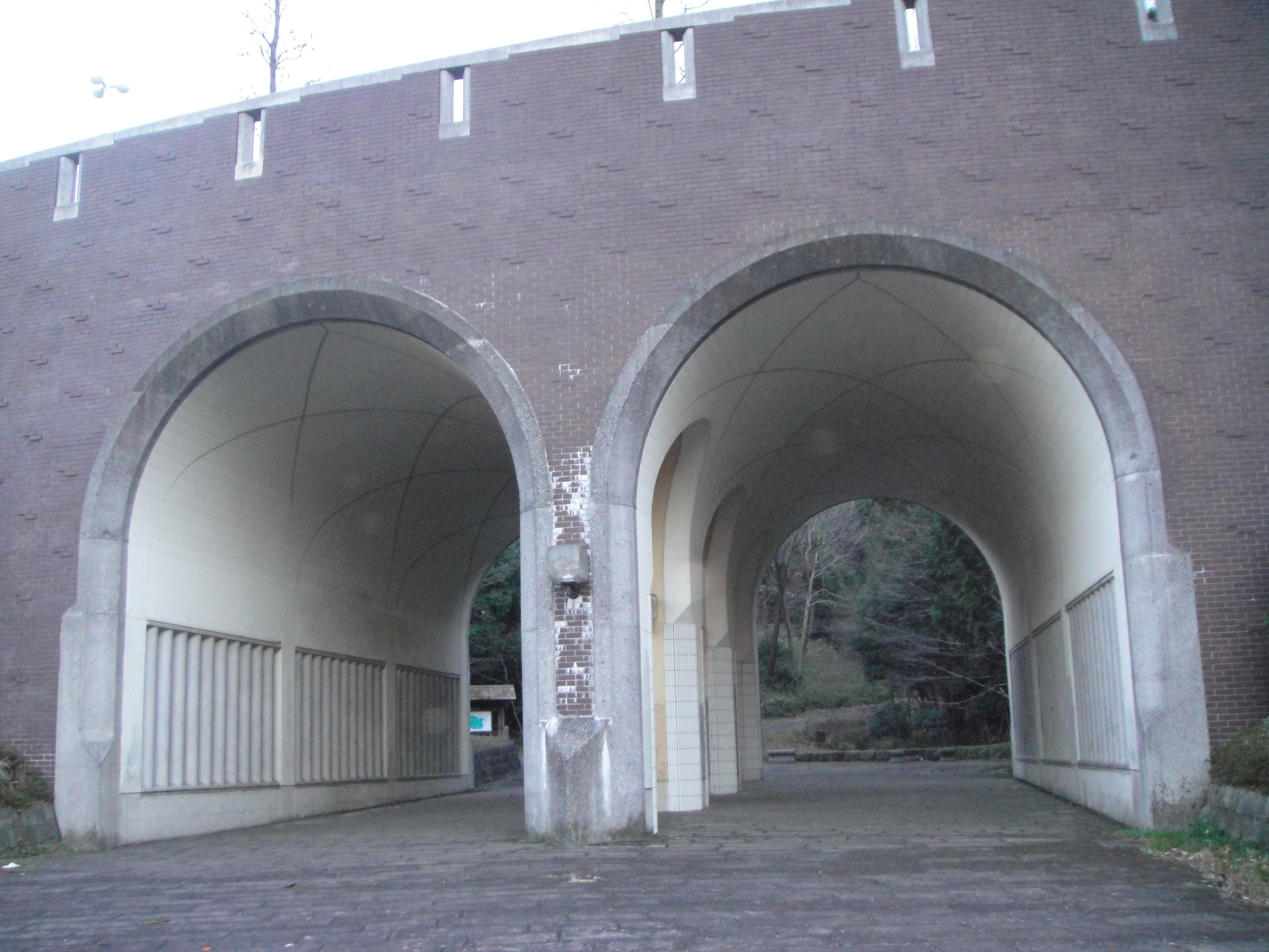 蓮生寺公園めがね橋